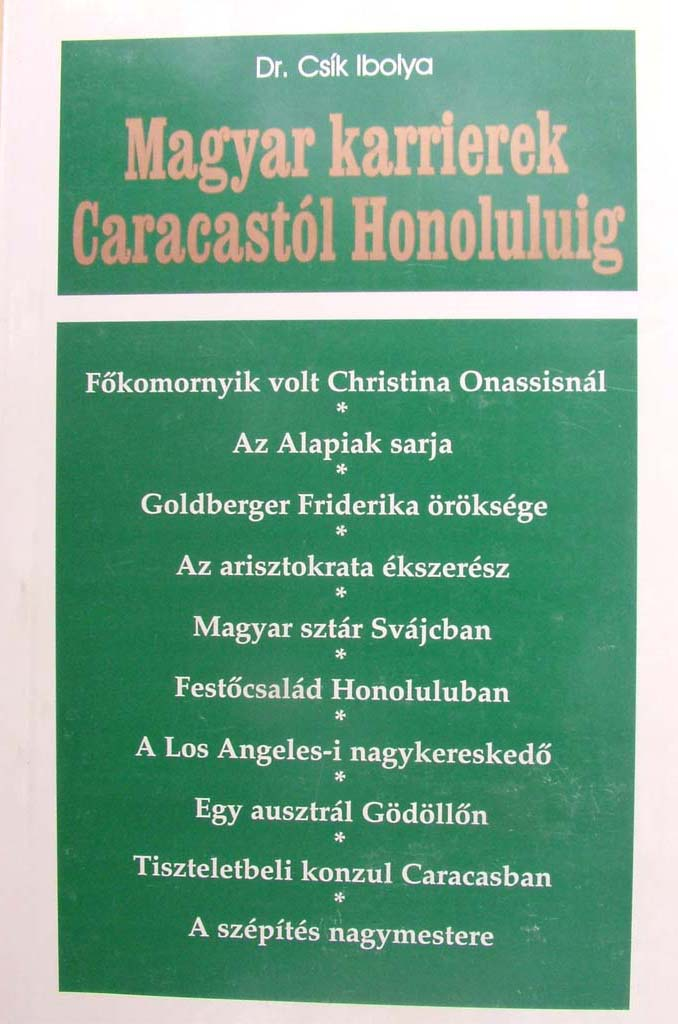 könyv